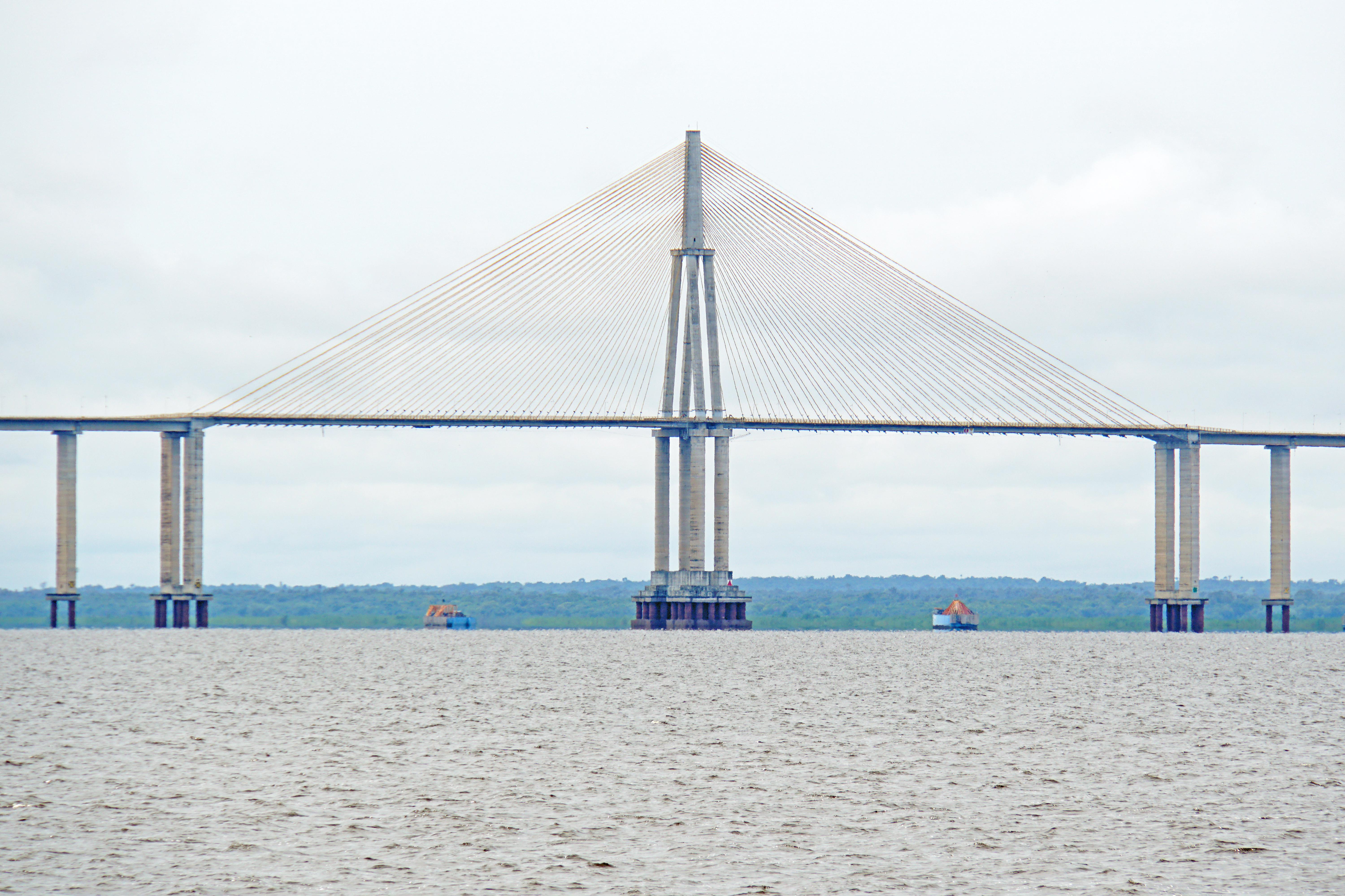 Parte estaiada da Ponte Rio Negro, em Manaus, capital do Estado do Amazonas.